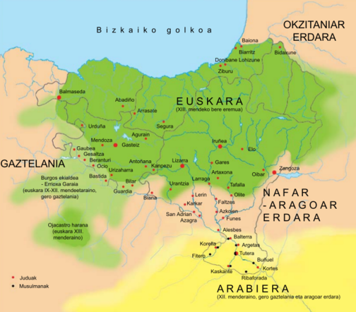 Euskal Herriko hizkuntzak eta gutxiengo erlijiosoak Behe Erdi Aroan (XIII), UEUren kondaira.eus webgunetik hartua.